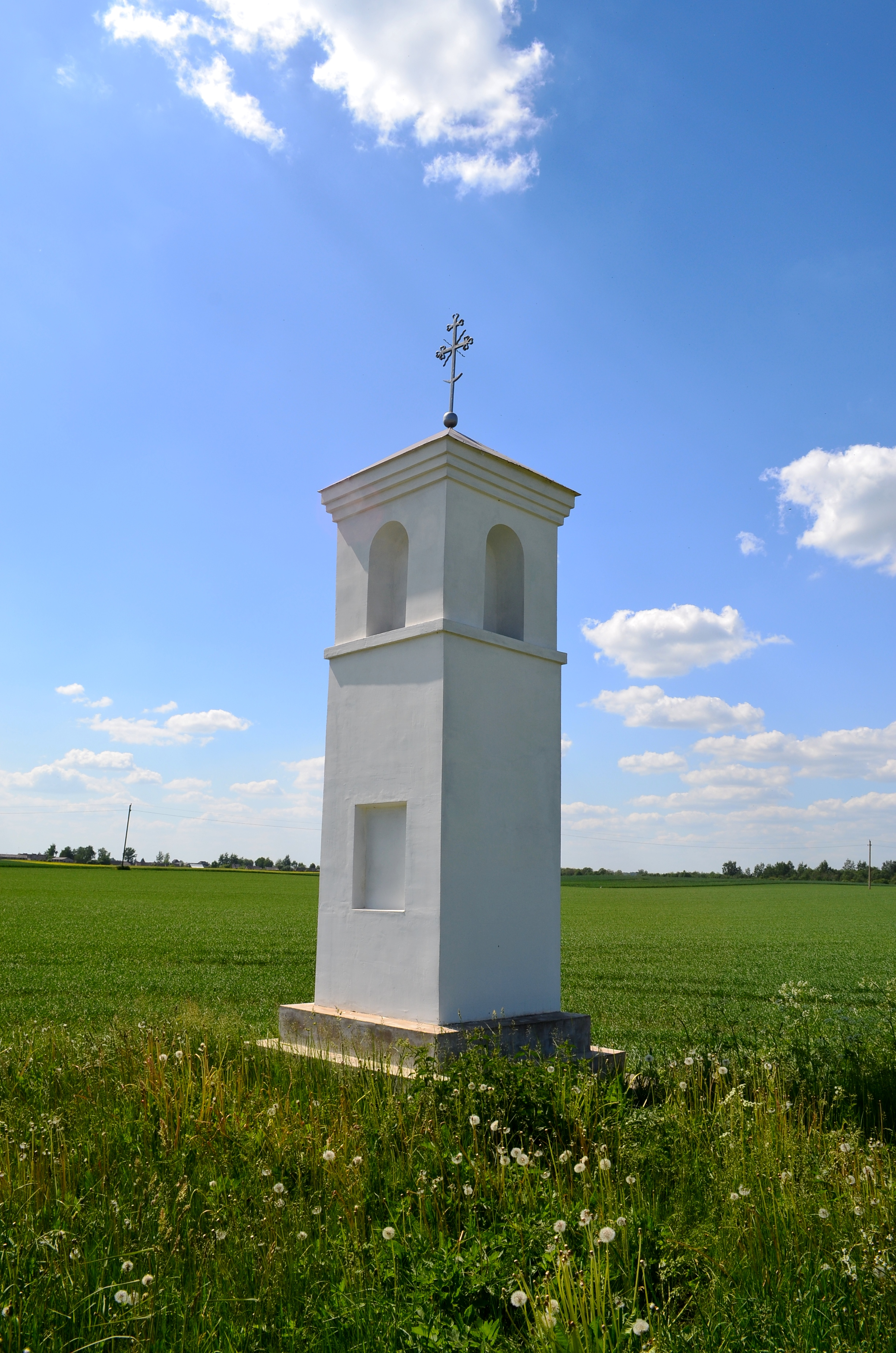 Minčaičių koplytėlė, Joniškio raj.